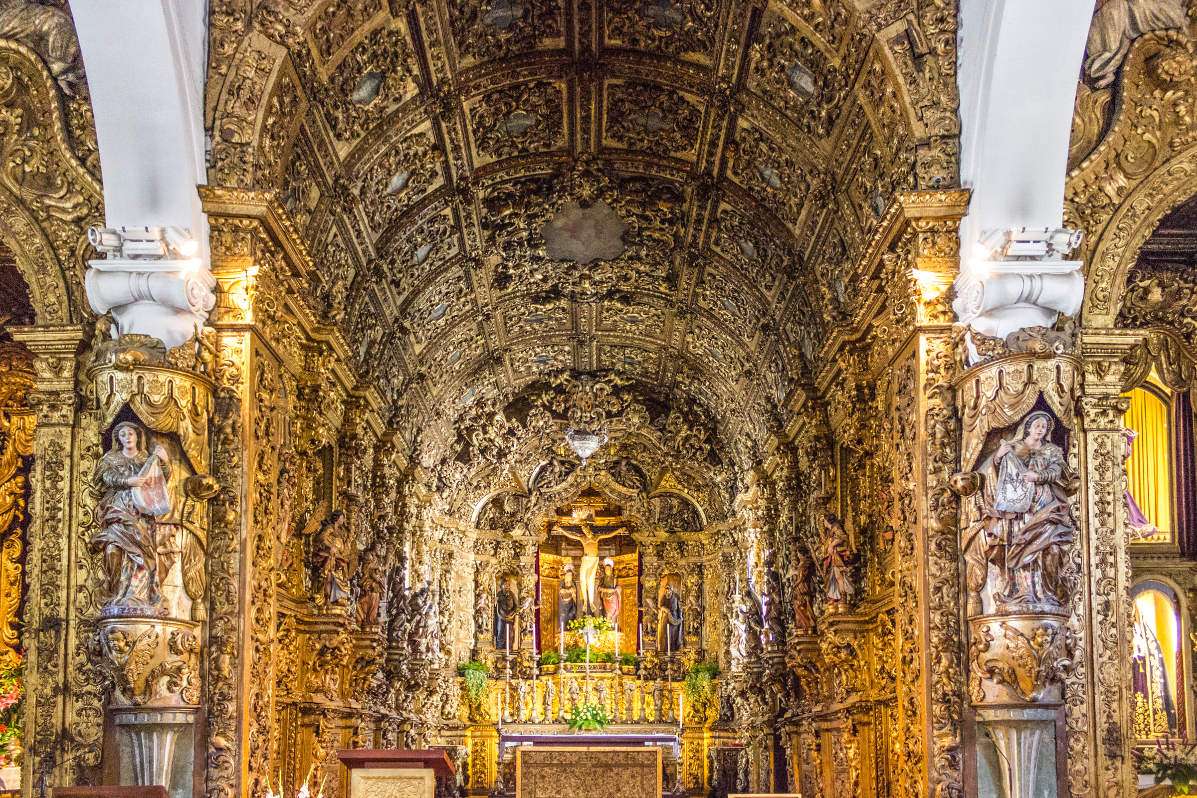 Santuário do Senhor de Matosinhos, Porto metropolitan area